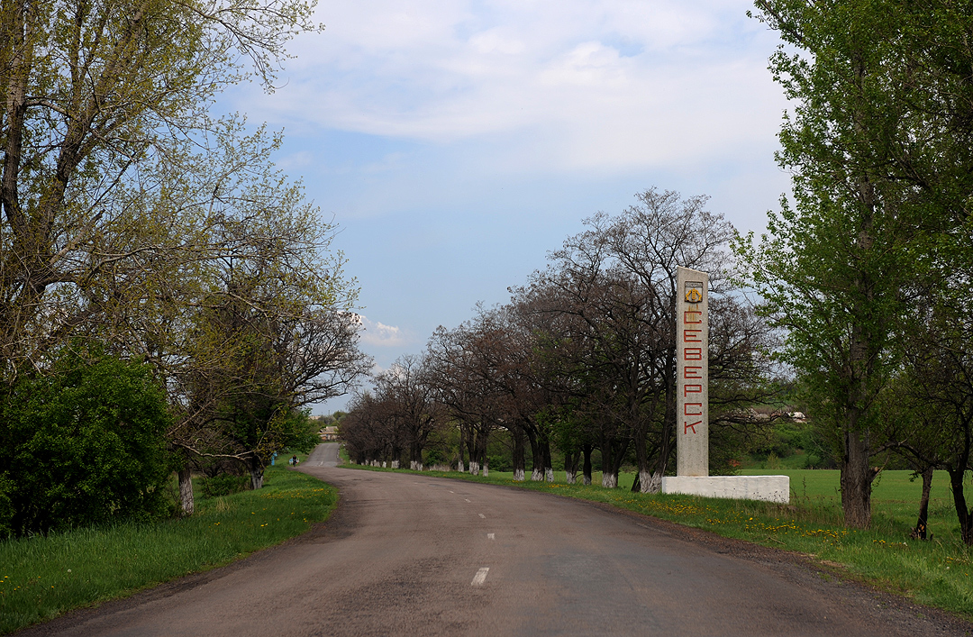 Северск